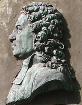 Johann Julius Hecker, Ausschnitt Denkmal Das Denkmal steht auf der Schlossinsel in Berlin-Köpenick Selbst fotografiert, Mai 2004 GNU FDL